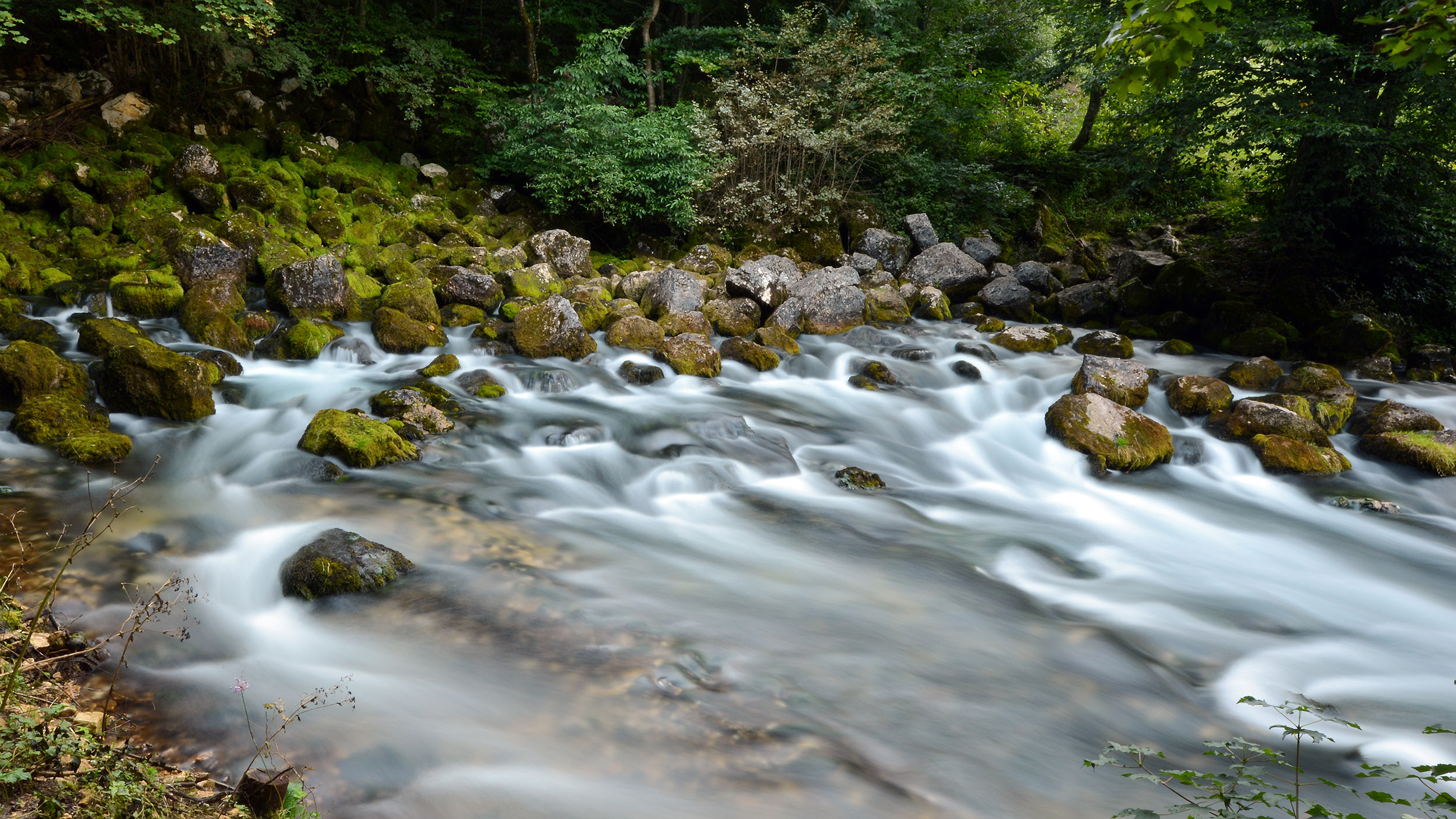 Vrelo Plive, Opština Šipovo, RS, BiH Сликава е подигната во рамките на проектот „По трагата на душата 2015“.